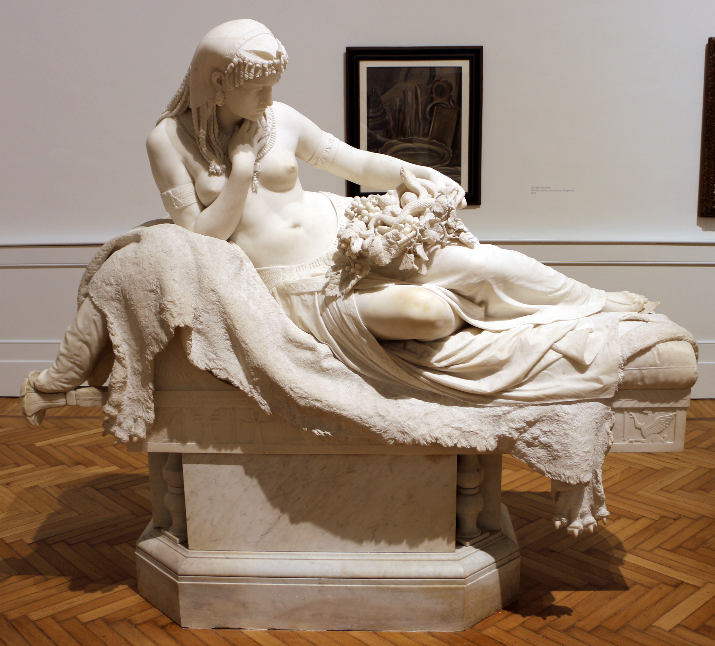 Sculptures in the Galleria nazionale d'arte moderna (Rome) This is a photo of a monument which is part of cultural heritage of Italy.